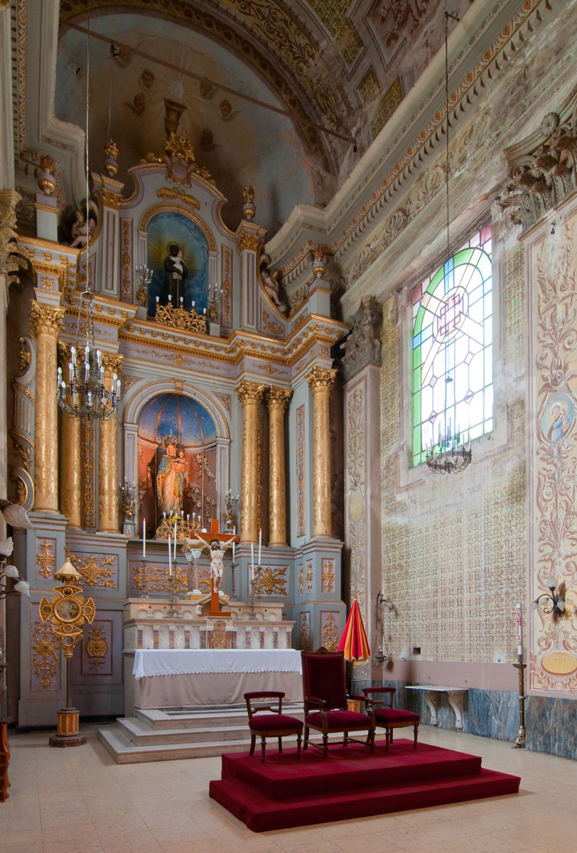 Basílica de Nuestra Señora y San Benito de Palermo con su equipamiento.. Ubicada en el departamento de Paysandú